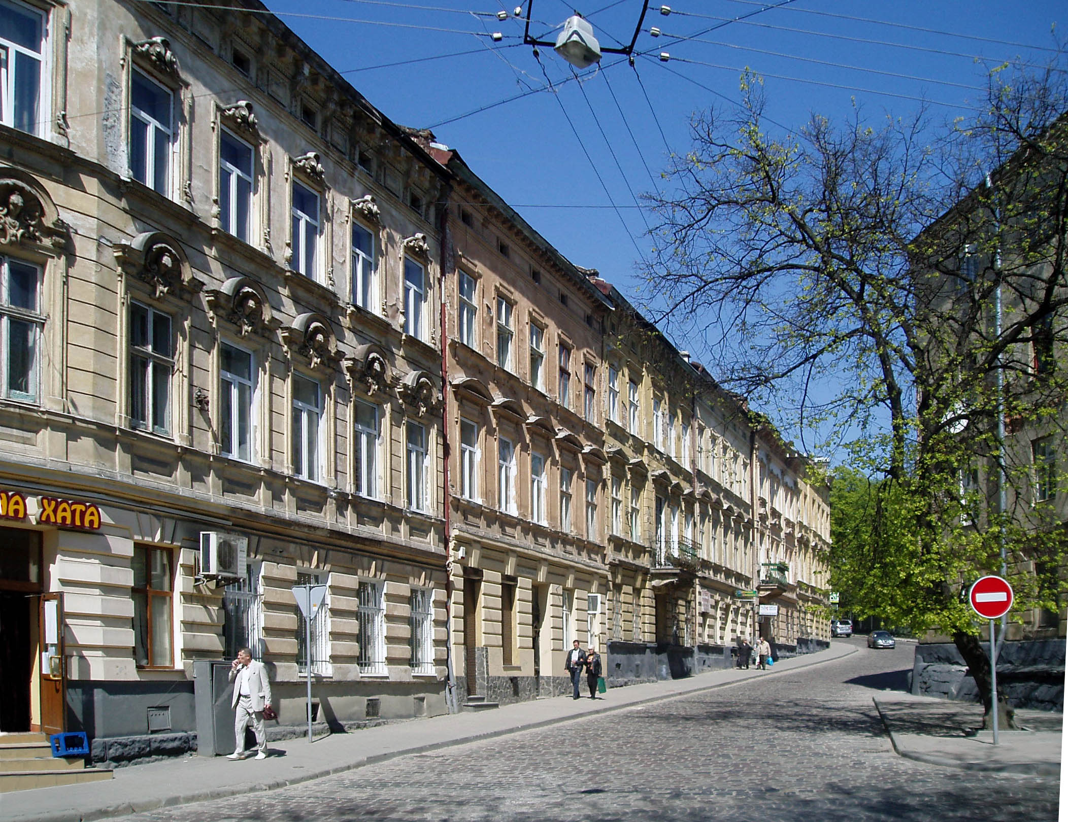 Вулиця Гуцульська у Львові (початок)